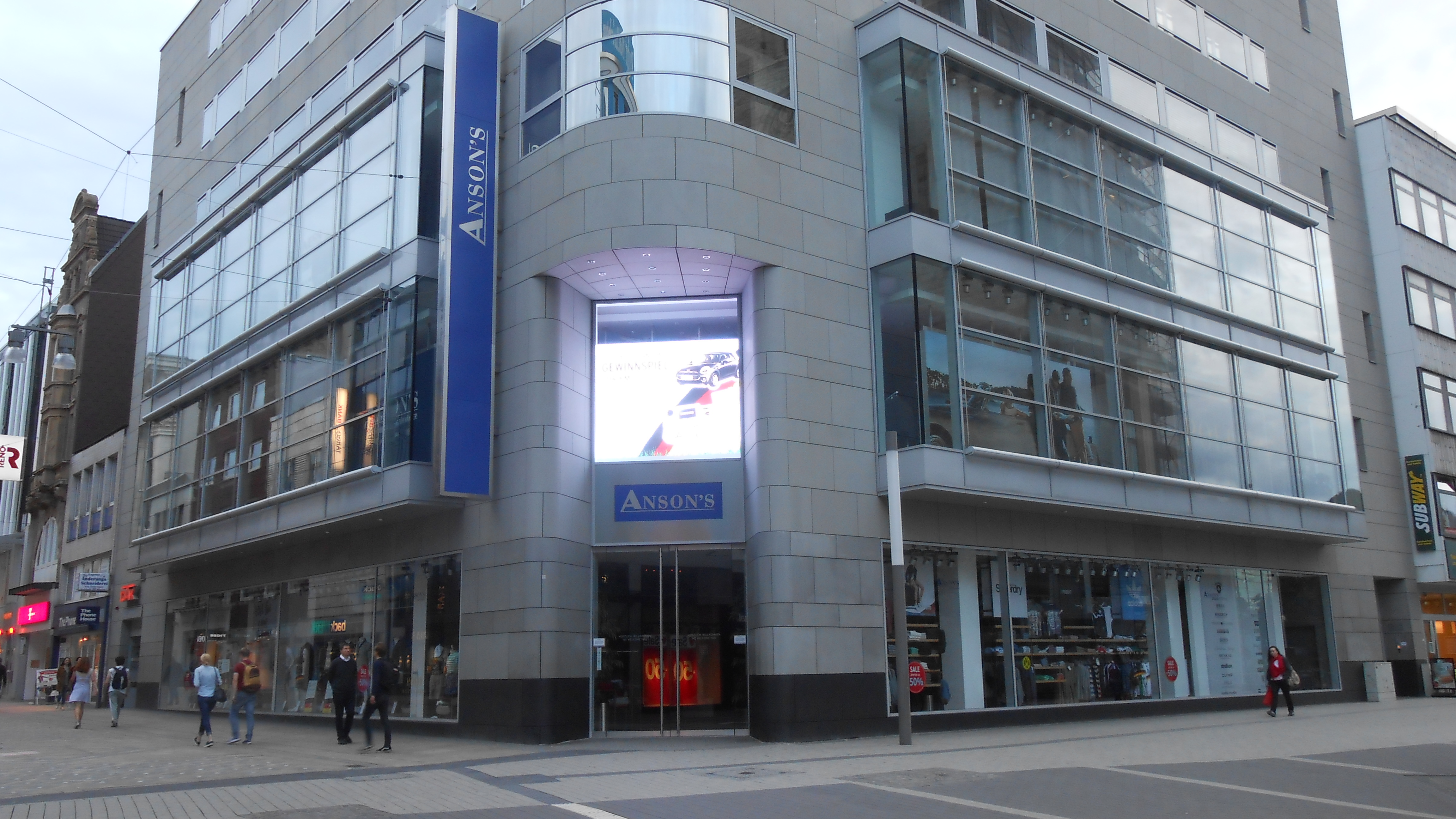 Filiale der Anson's Herrenbekleidung, im früheren Haus des Herrenausstatters Fischers am Dortmunder Westenhellweg.